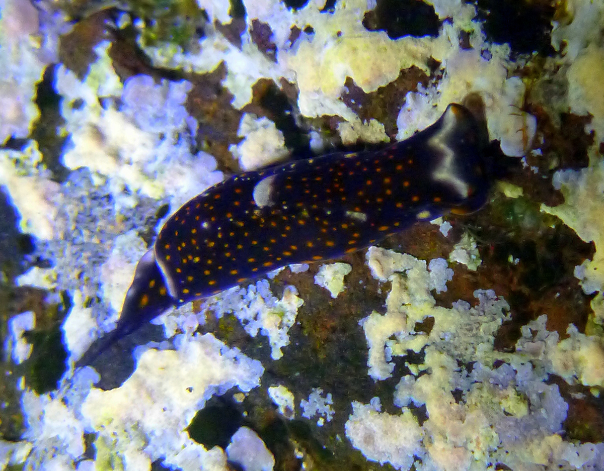 Biuve fulvipunctata à la Réunion.